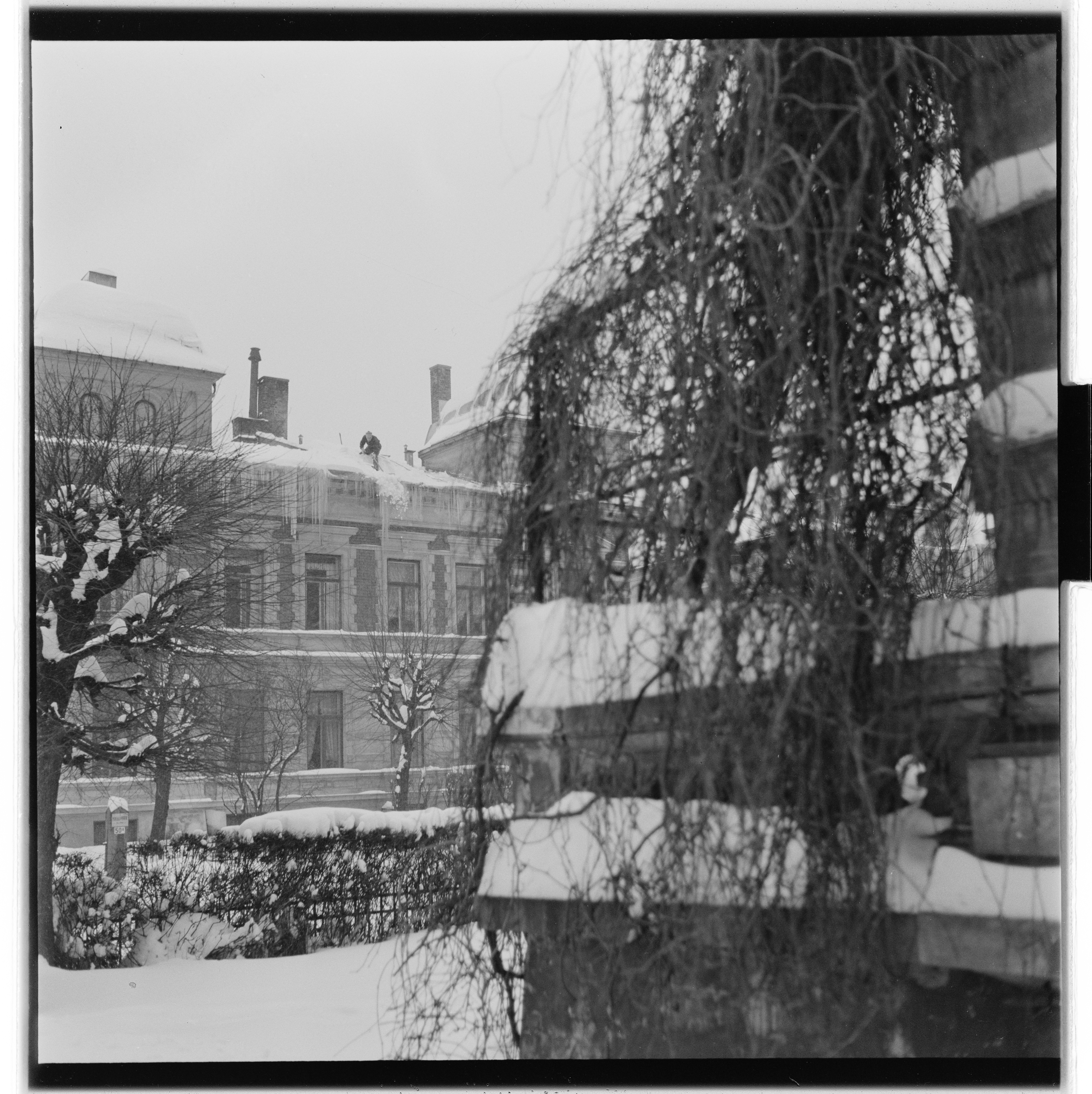 Bildet er hentet fra Arkivverket. Fimbulvinteren 1954. Snømåking fra tak Arkivinstitusjon : Riksarkivet Arkivnavn : Billedbladet NÅ Sted : Norge, Oslo, Oslo, Ukjent Avbildet